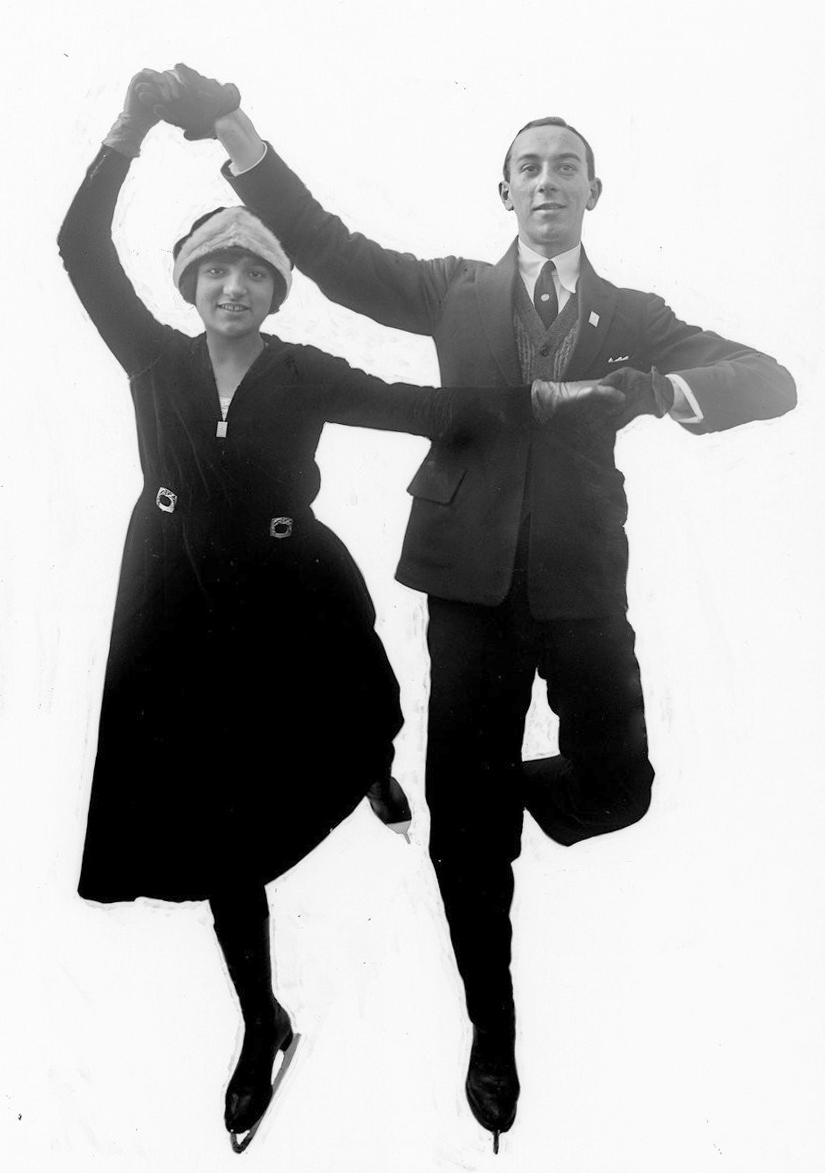 Pierre Brunet, A. Jolly [i. e. Andrée Joly, patineurs artistiques] : [photographie de presse] / [Agence Rol]